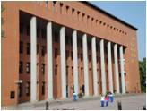 中壢高級中學行政大樓的羅馬柱。